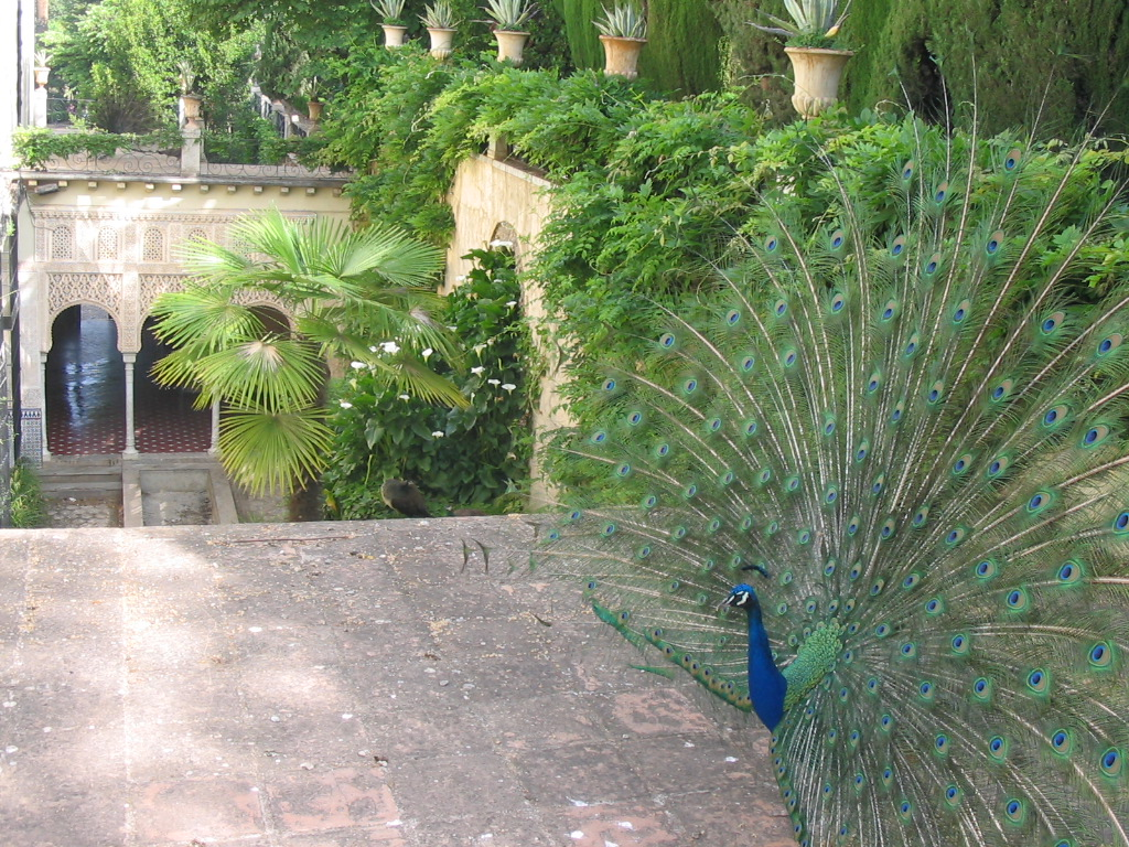 Pavo real en el Carmen de los Mártires